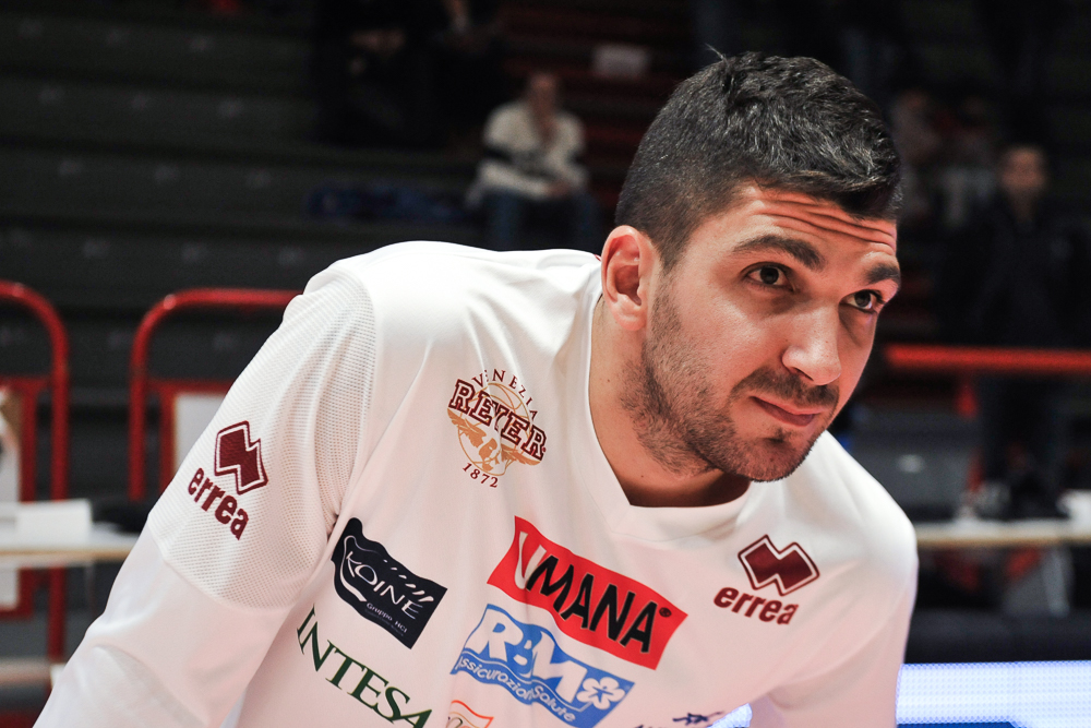 Esteban Batista con la maglia della Reyer Venezia